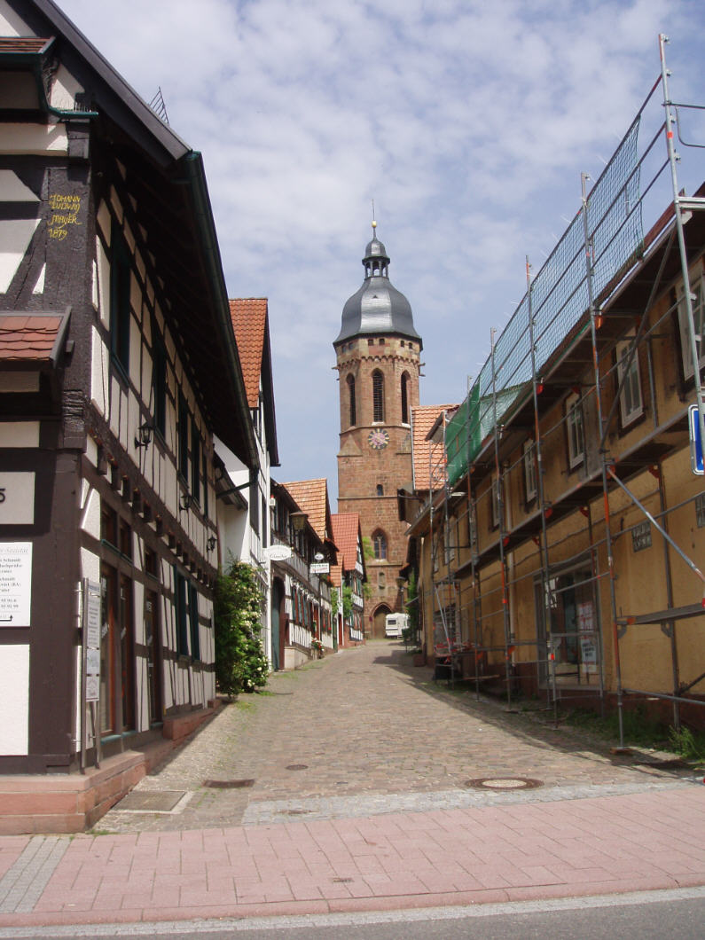 Turmstraße in Kandel von unten